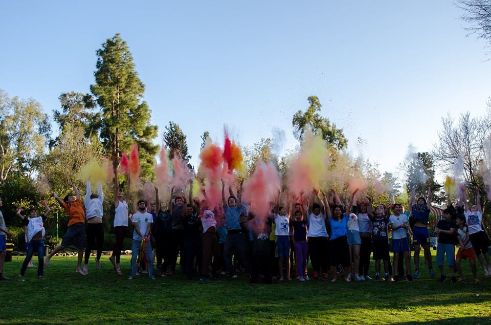 סיום פעילות מלחמת צבע כחלק מאירועי פורים ברעות